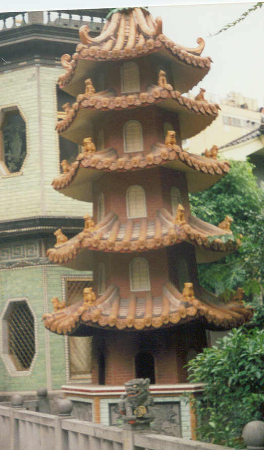 Печь для сжигания жертвенных денегПечь для сжигания жертвенных денег, Тайбэй, Тайвань